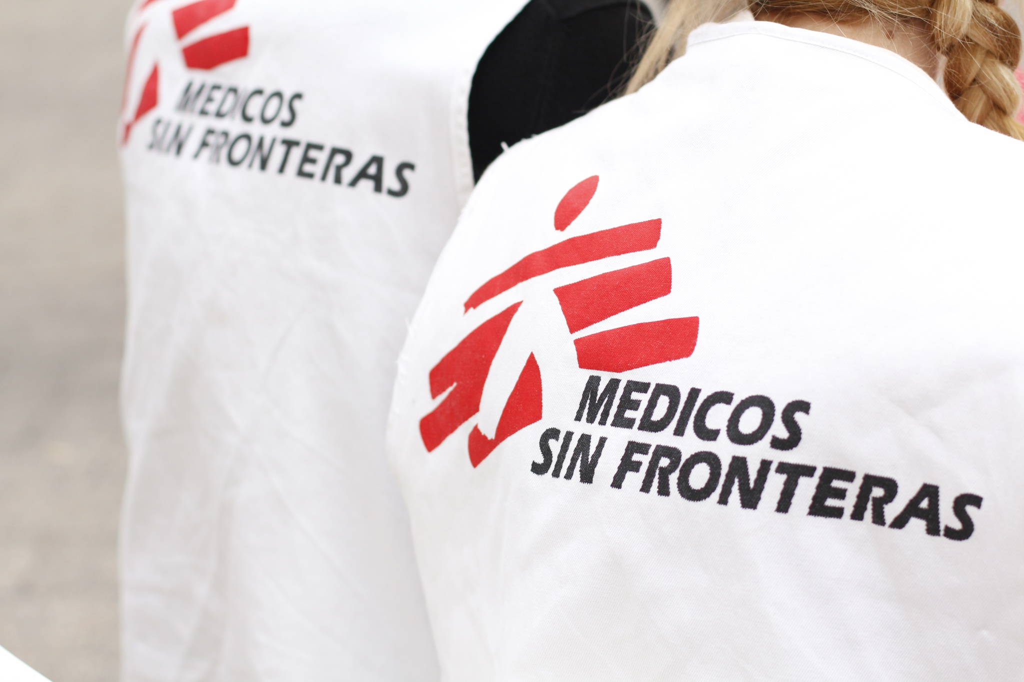 Médicos sin fronteras, en Murcia.